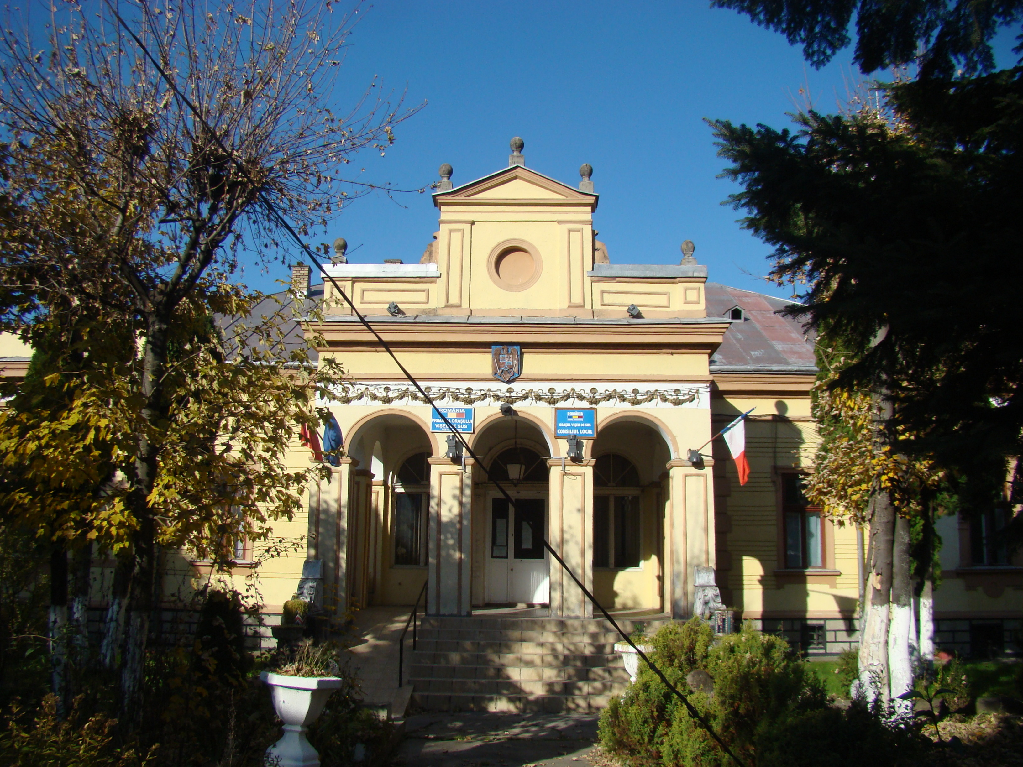 Casa Pop Simion, azi Primăria orașului Vișeu